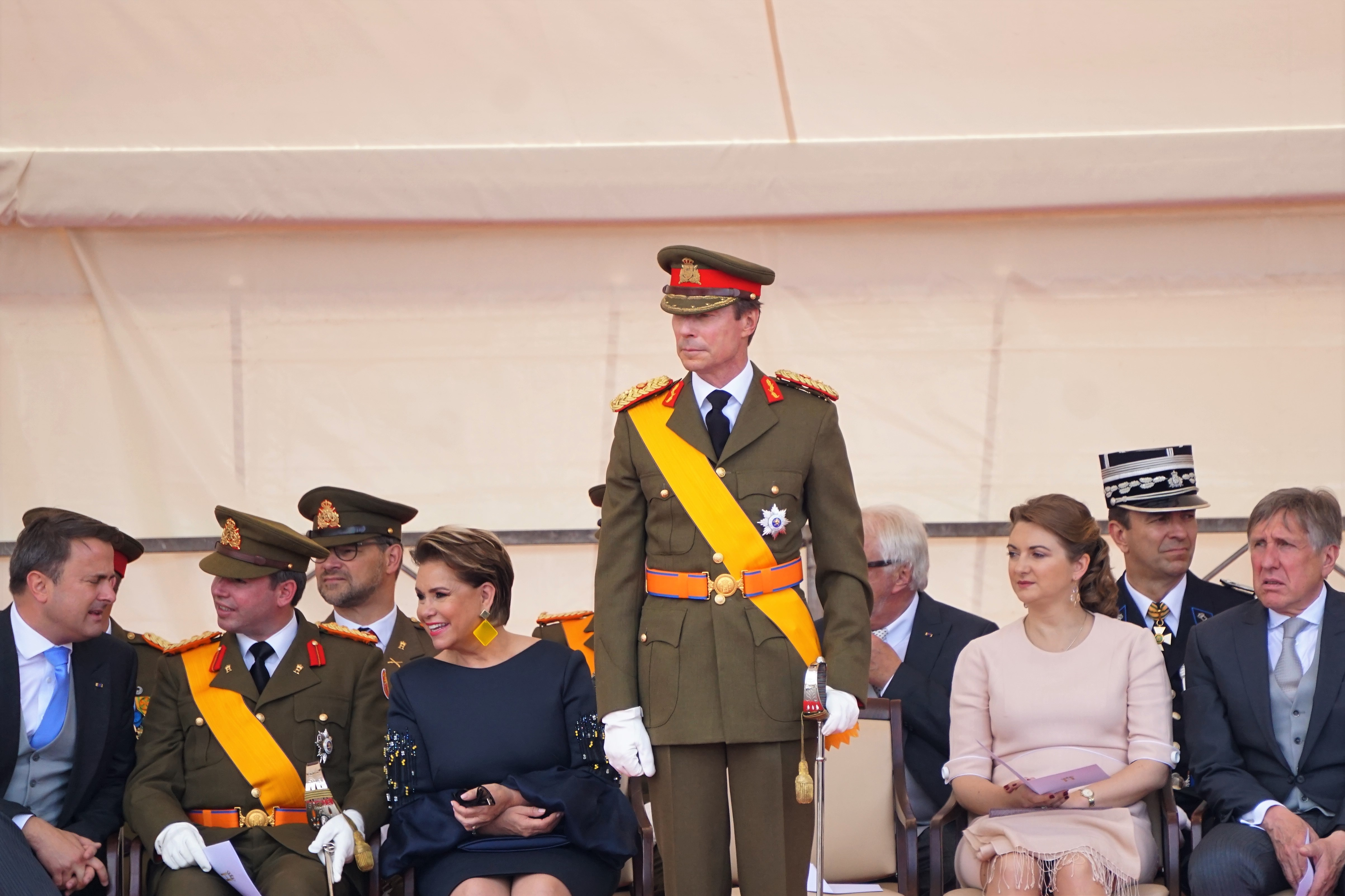 Fête nationale luxembourgoise 2019. La famille grand-ducale sur la tribune d'honneur lors du défilé militaire.